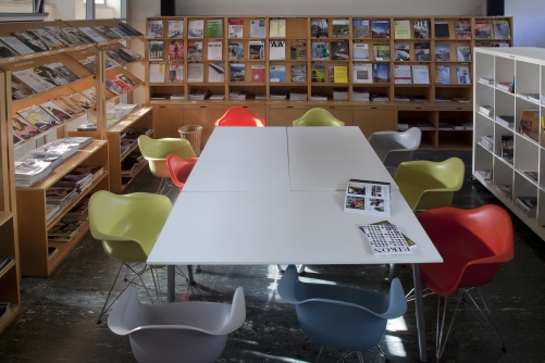 Zeitschriftenlesesaal der Universitätsbibliothek der Universität für angewandte Kunst Wien